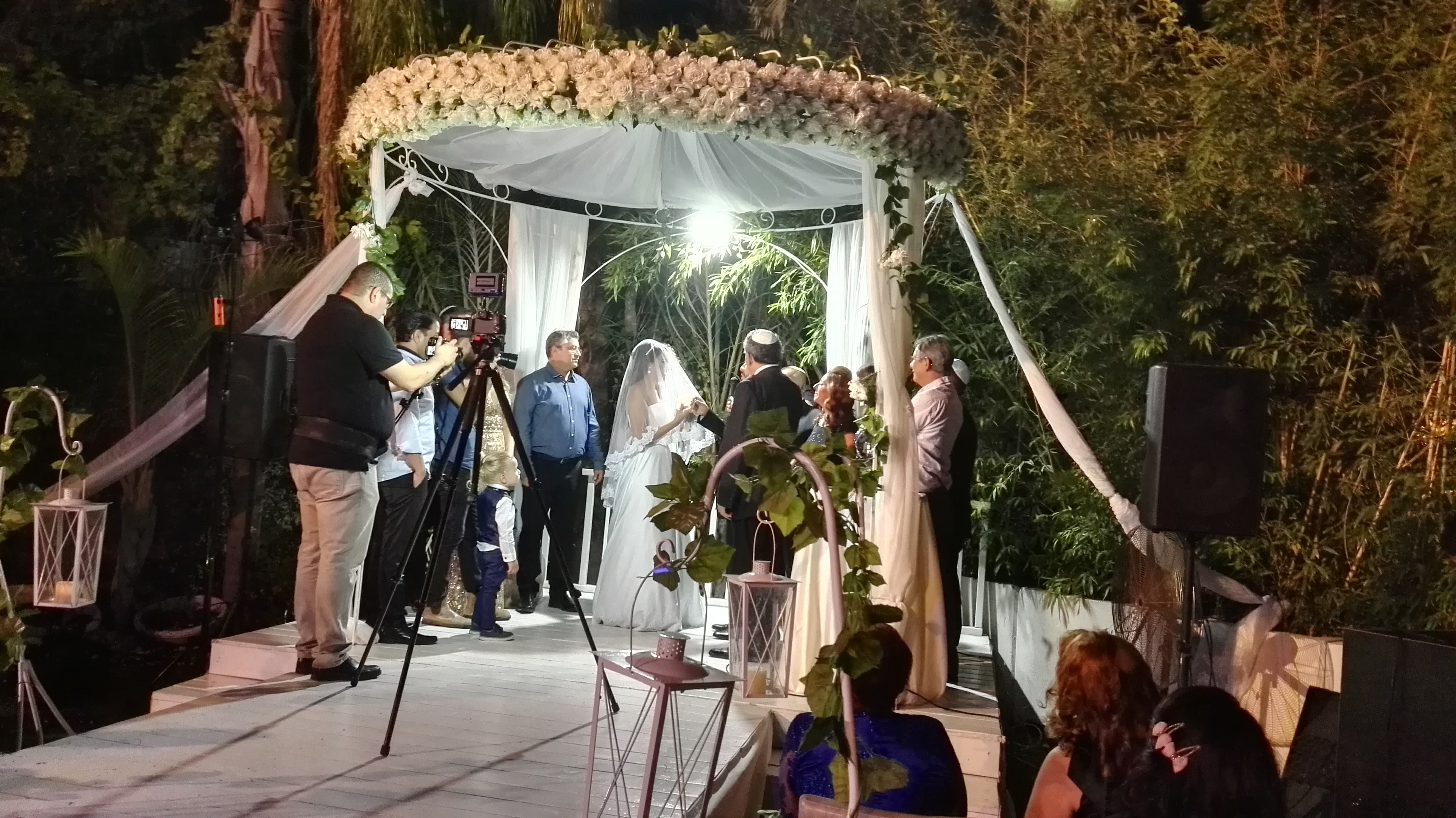 חתונה מסורתית ע"י רב אורטודוקסי הנערכת על ידי הרבנות החילונית